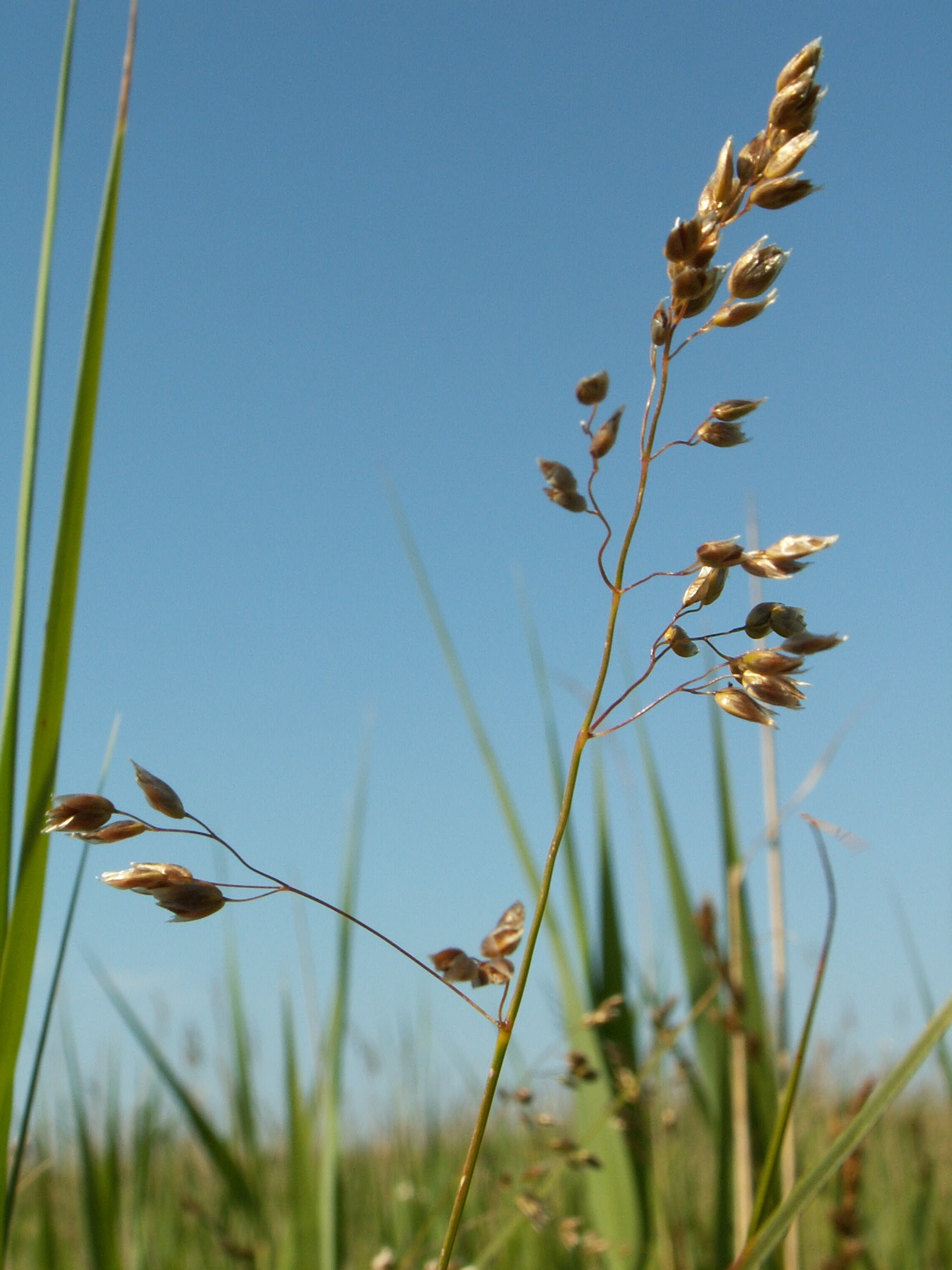 Hierochloe odorata. Swinoujscie, NW Poland